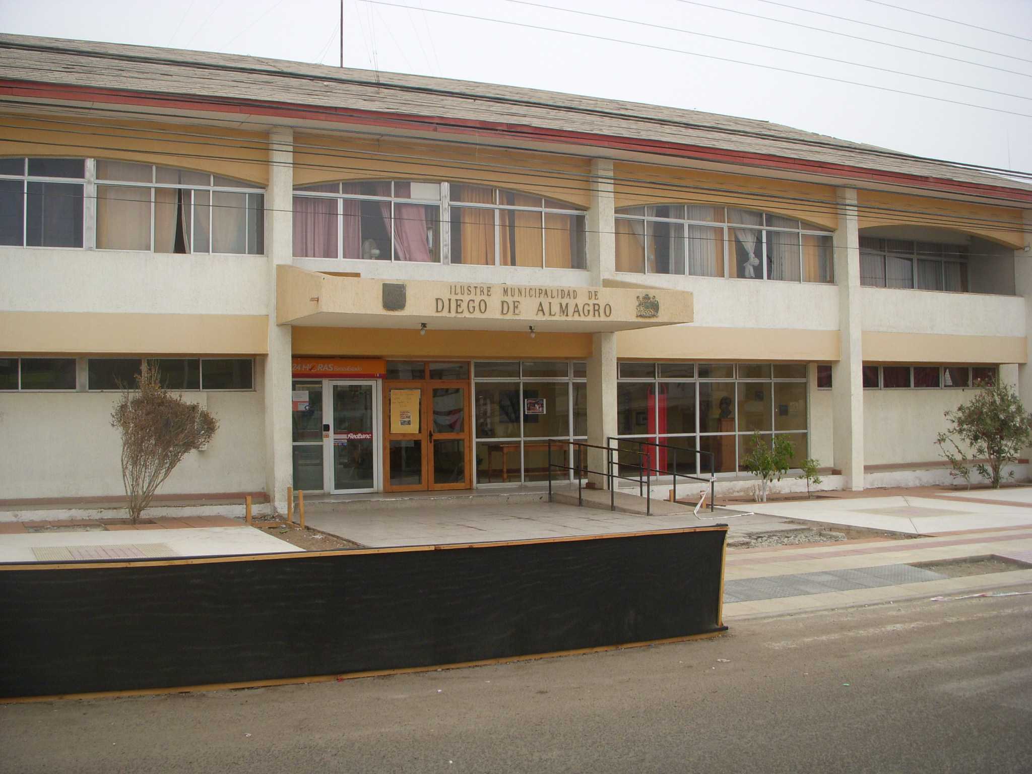 Diego de Almagro, Atacama, Chile - Municipalidad